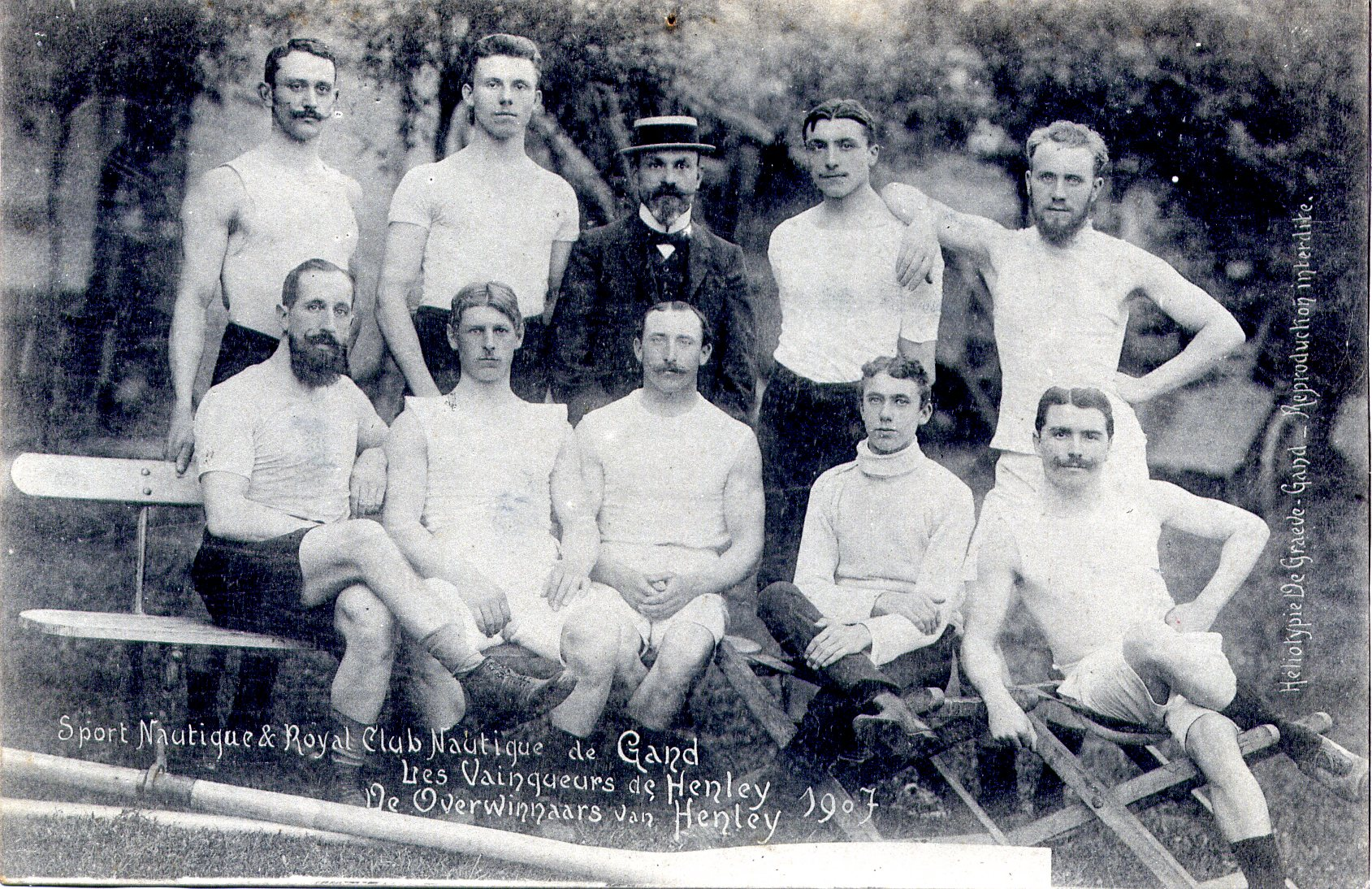 winnaars 1907 - Koninklijke Roeivereniging Club Gent,P. de Geyter, G. Visser, U. Molmans, A. Van Roy, François Vergucht, Polydore Veirman, O. de Somville, R. Poma (stroke), R. Colpaert (cox)